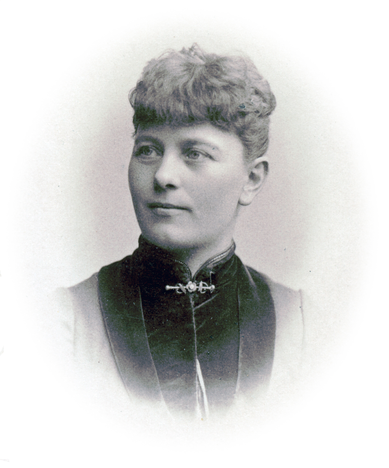 Anna Karlsohn, sångare vid Kungliga Operan 1888